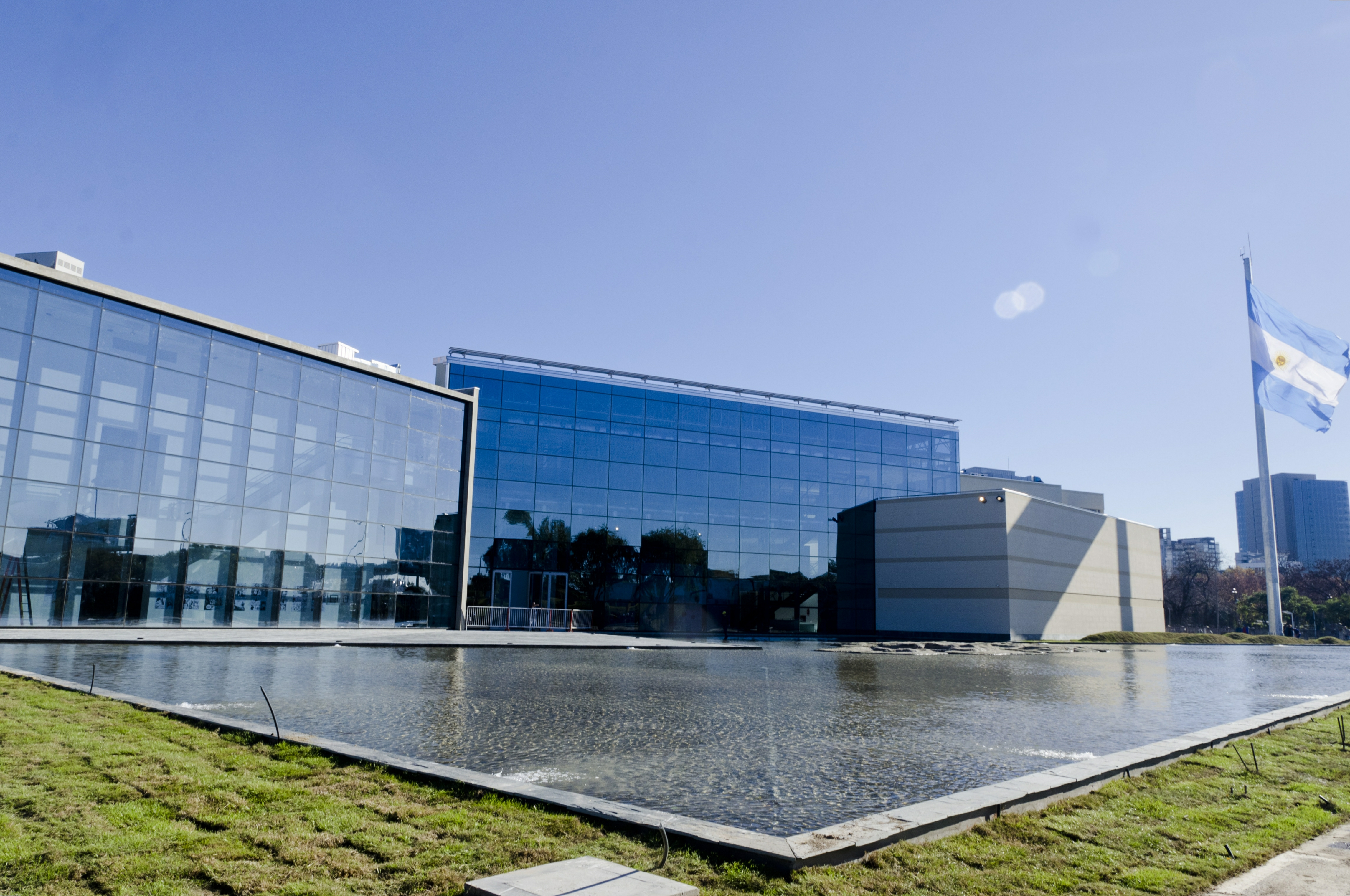 The Falklands and South Atlantic Islands Museum (Museo Malvinas e Islas del Atlántico Sur). Núñez, Buenos Aires. Photo: Romina Santarelli / Ministerio de Cultura de la Nación.